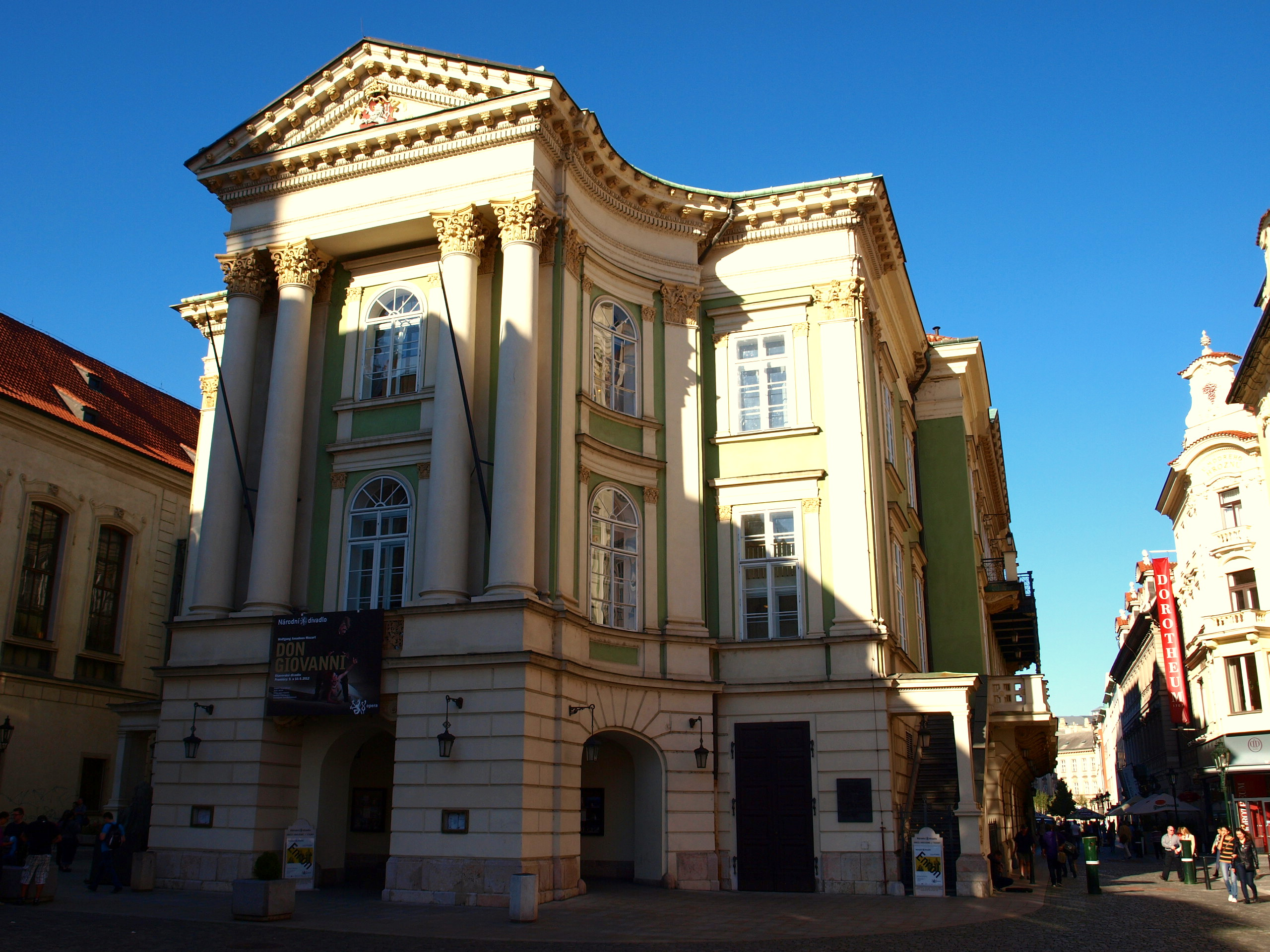 Stavovské (Nosticovo) divadlo